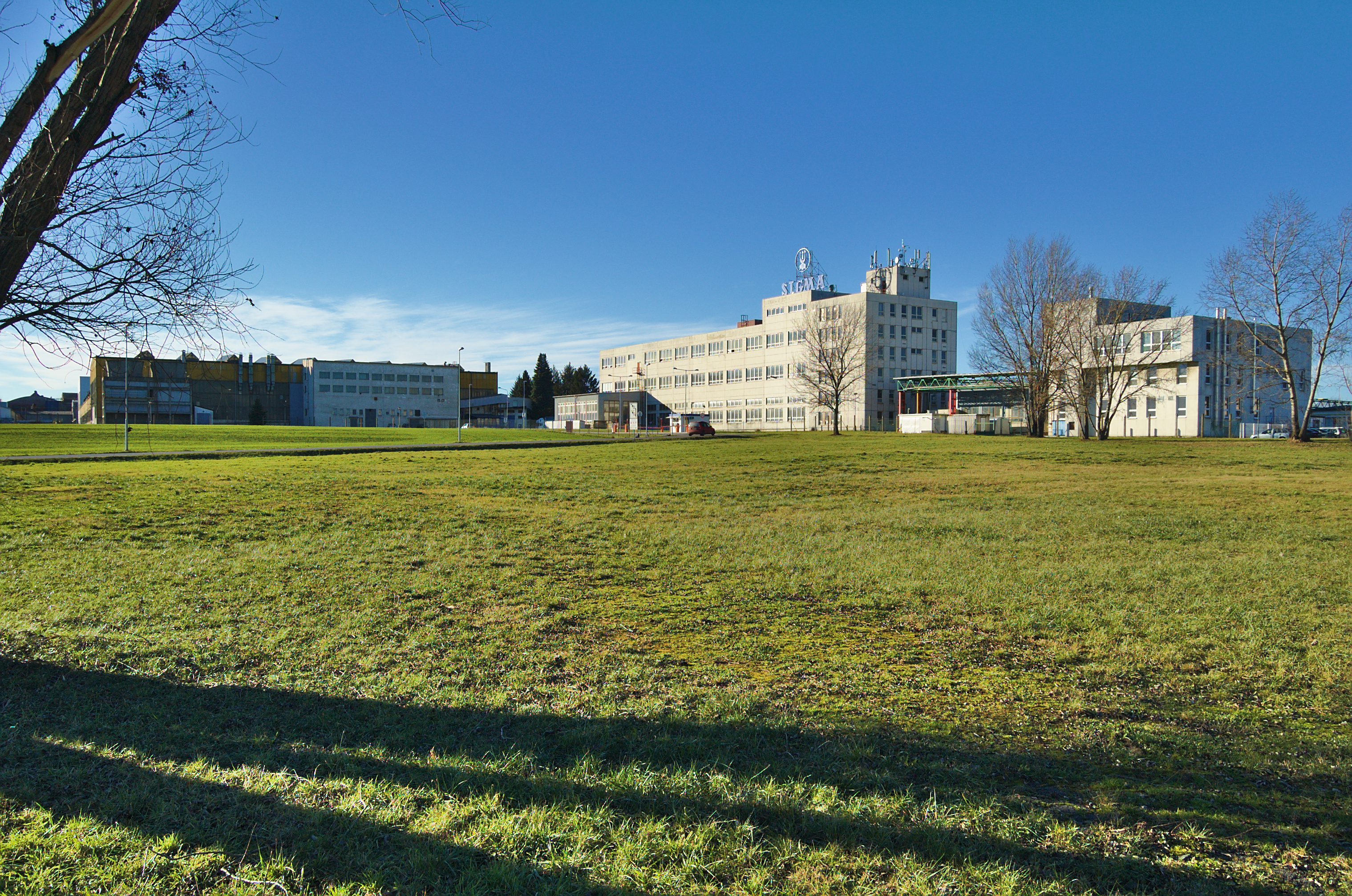 Sigma Lutín, okres Olomouc